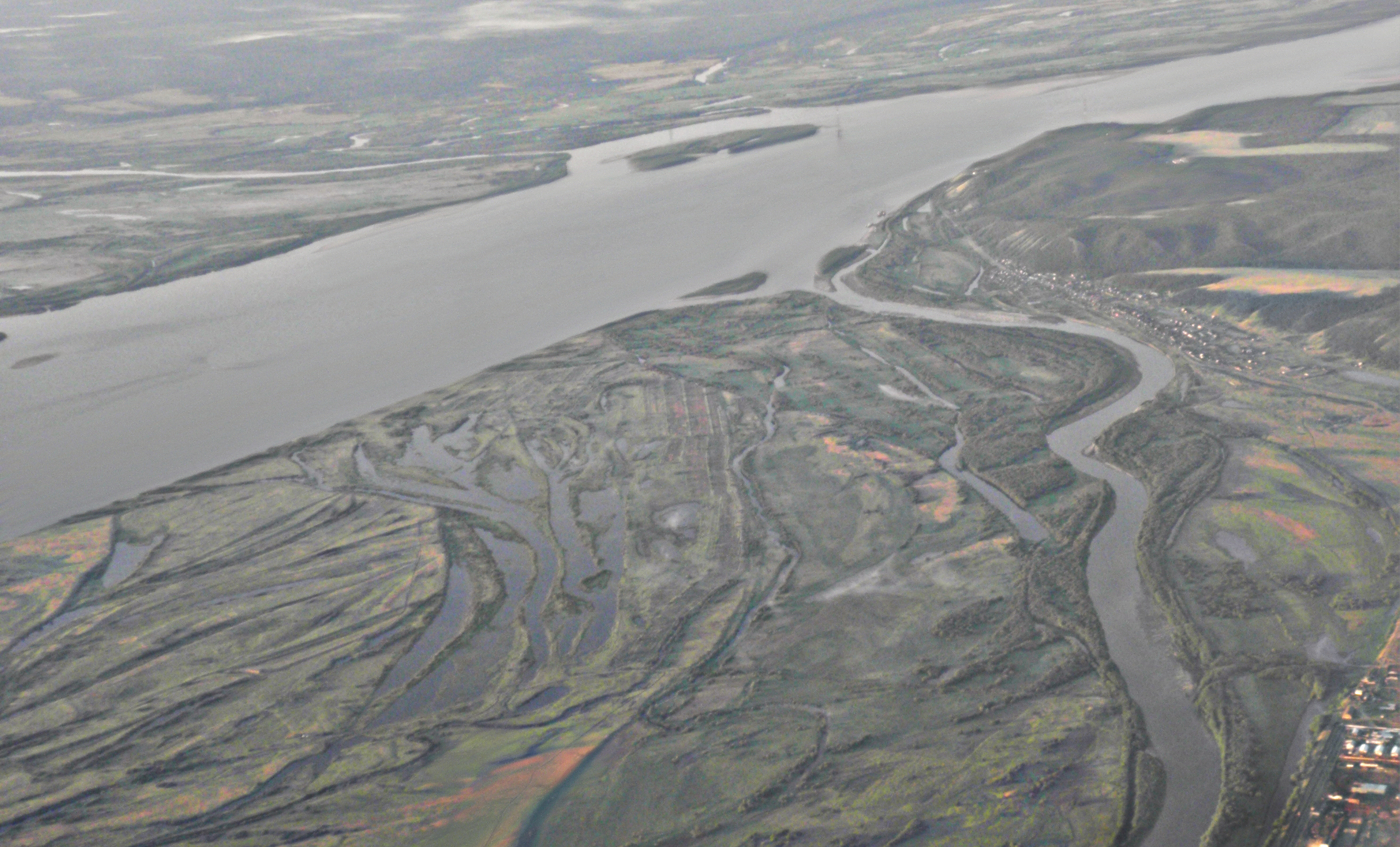 Вид с самолёта. Лена, южная часть острова Улуу-Арыы, село Старая Табага и посёлок Табага на берегу Табагинской протоки